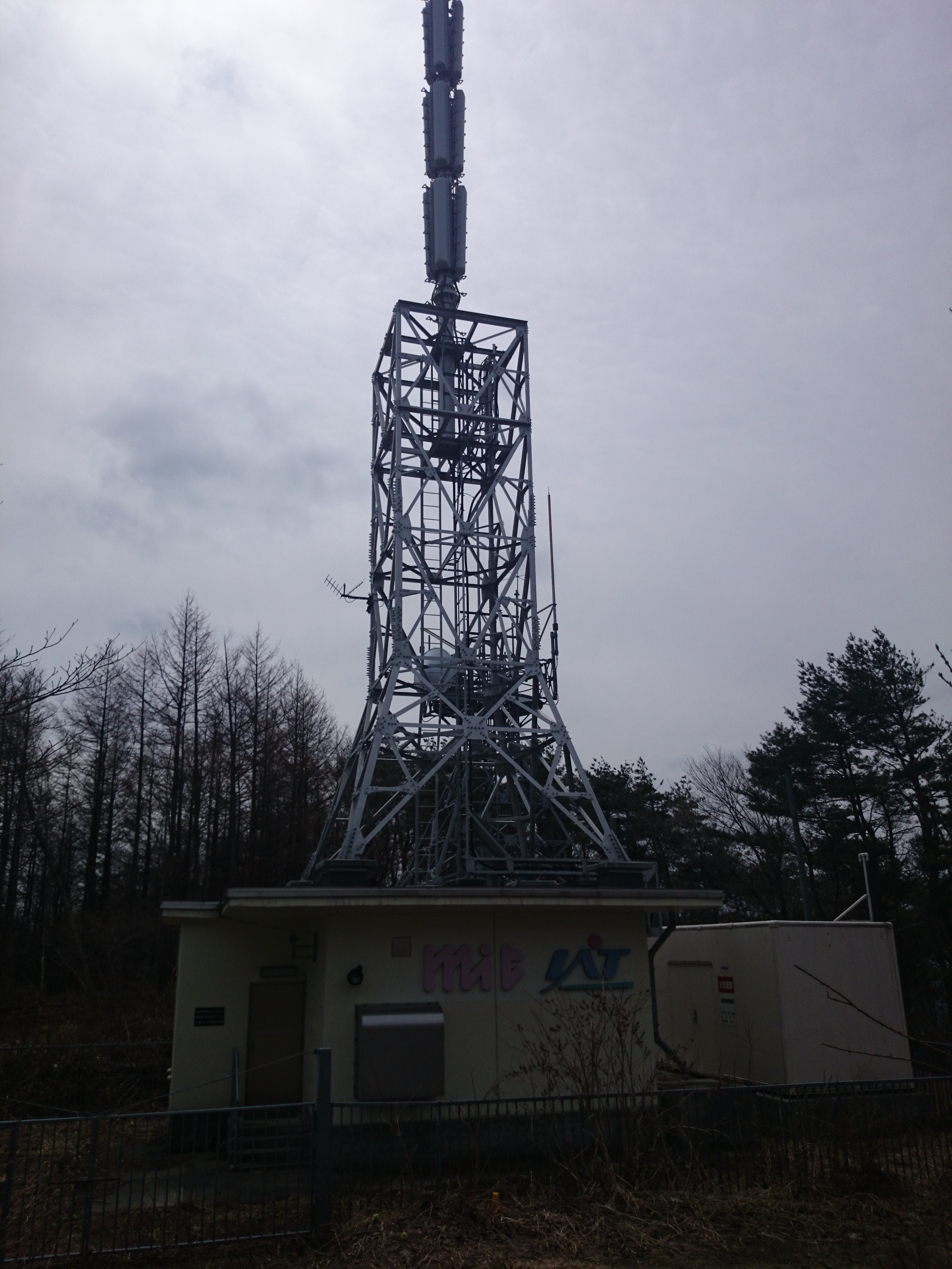 MIT・IAT一関送信所